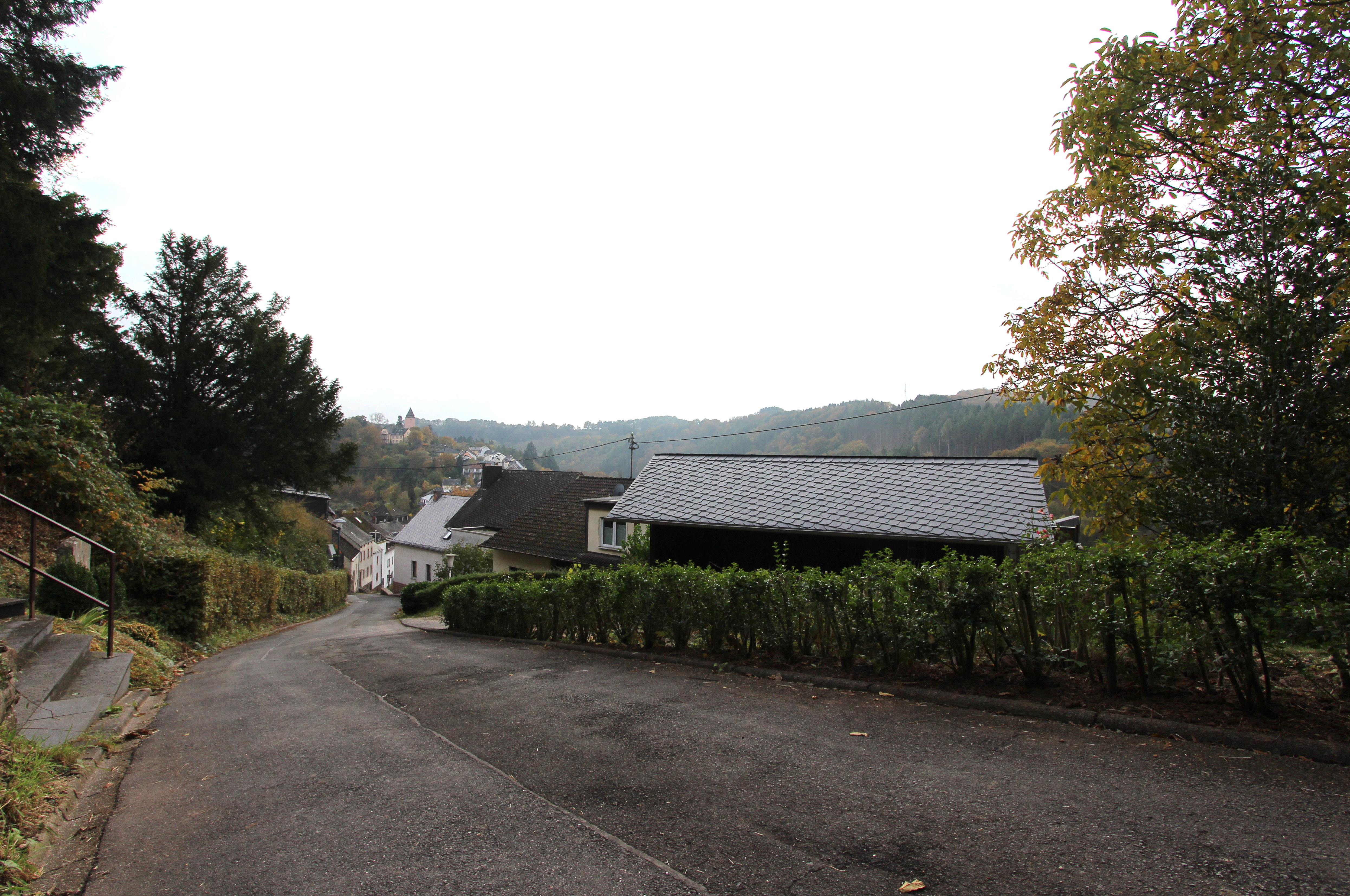 54655 Kyllburg. Die Synagoge von Kyllburg wurde 1911/12 errichtet. Die Synagoge stand in der Marienstraße am Südhang des Annenberges. Aufnahme von 2016.